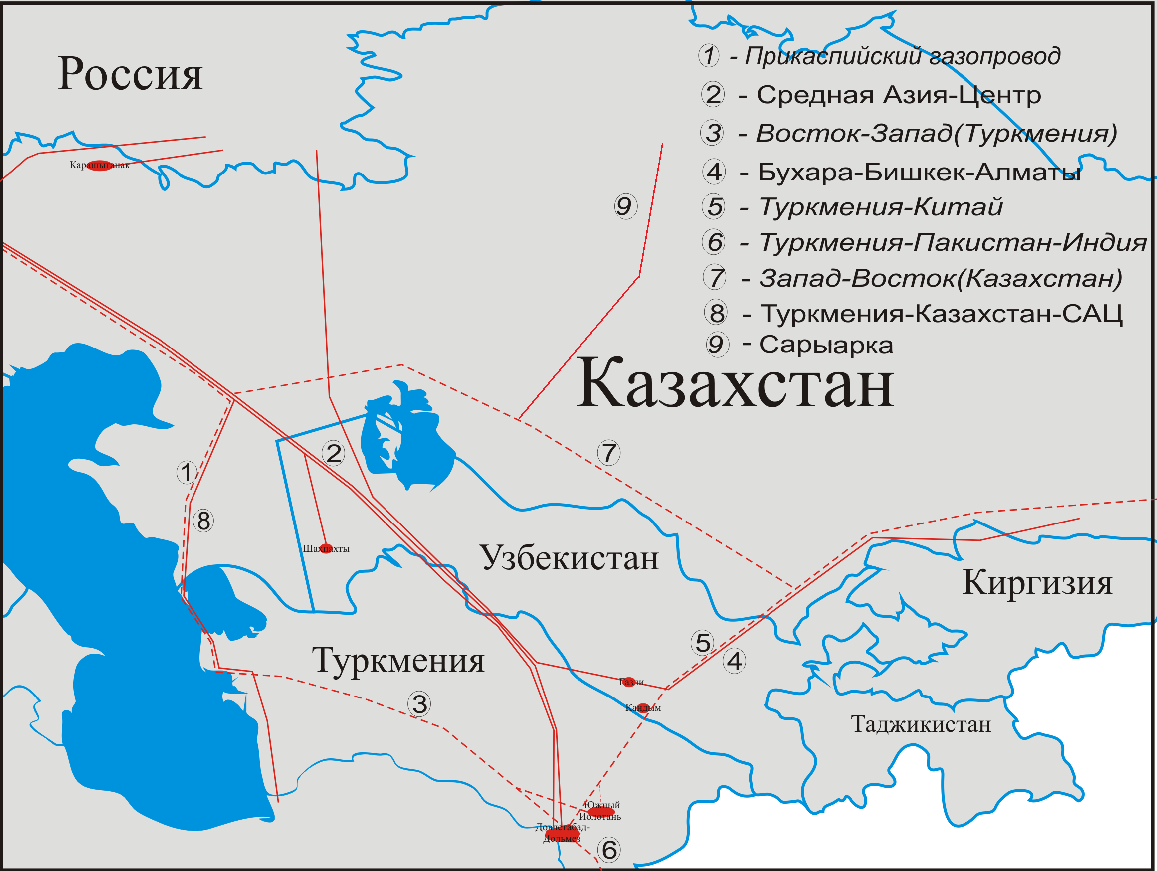 Карта расположение газопроводов Казахстана, Туркмении и Узбекистана